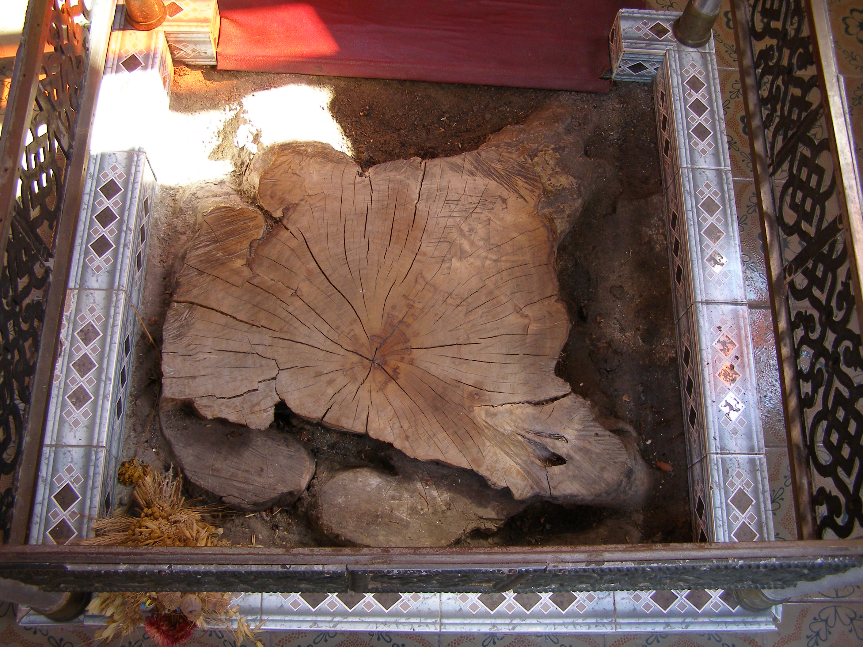 м. Вінниця, Свято-Воскресенська церква (Хмельницьке шосе, 5). У каплиці